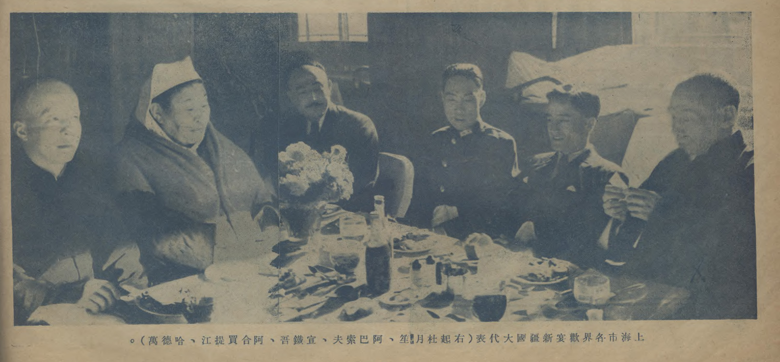 中文（中国大陆）: 新疆省國民大會代表於制憲國民大會在全國遊歷